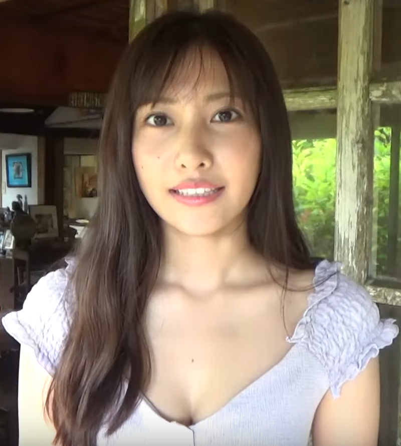 佐野ひなこです。